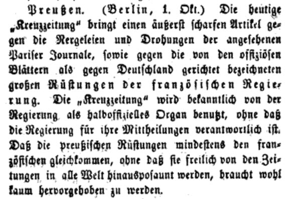 Amberger Tagblatt als Beispiel Kreuzzeitung Schnittstelle zwischen Politik und Publizistik